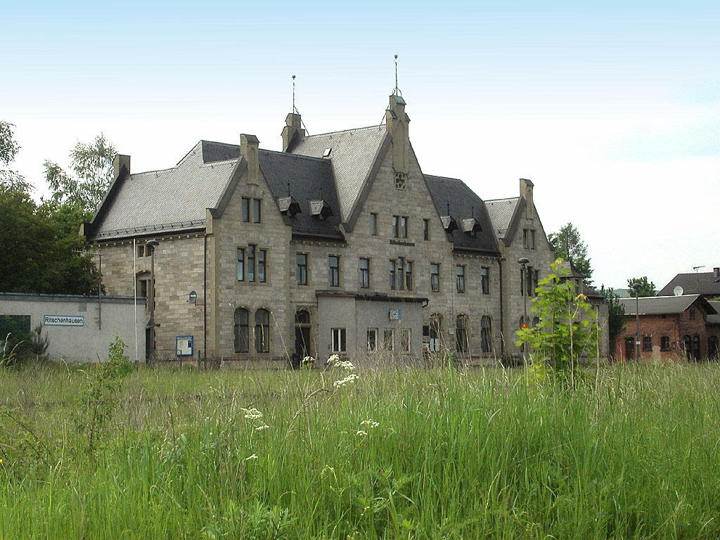 Ritschenhausen/Thüringen, Bahnhof von 1874